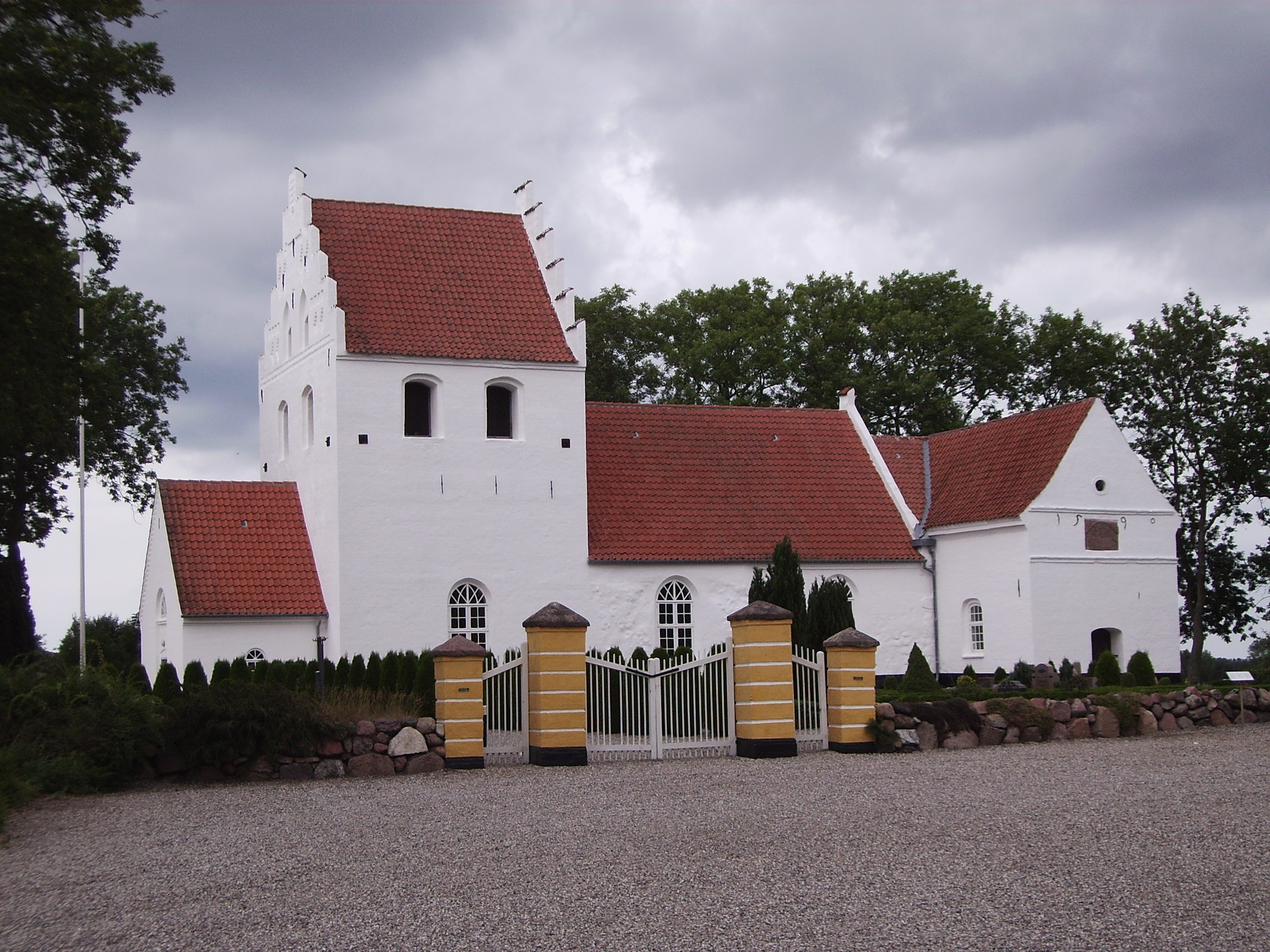 Nørre Sandager Kirke, Nørre Sandager Sogn, Skovby Herred, Odense Amt, Denmark (Danish Church) - Nørre Sandager Kirke fra syd